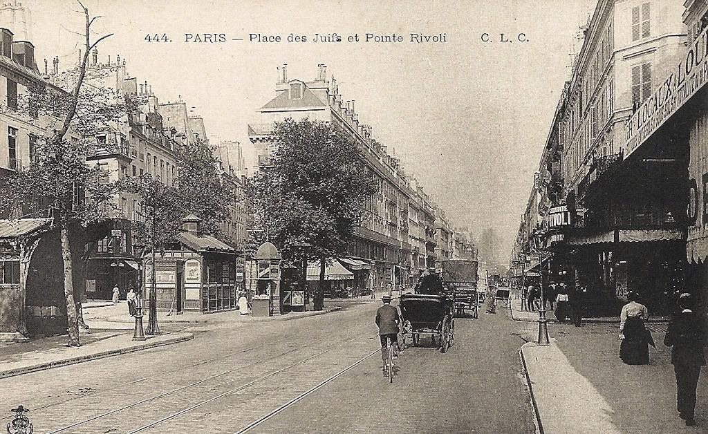 Cartes postale datant du début du XXè siècle, légendée "Place des Juifs" (métro Saint-Paul)